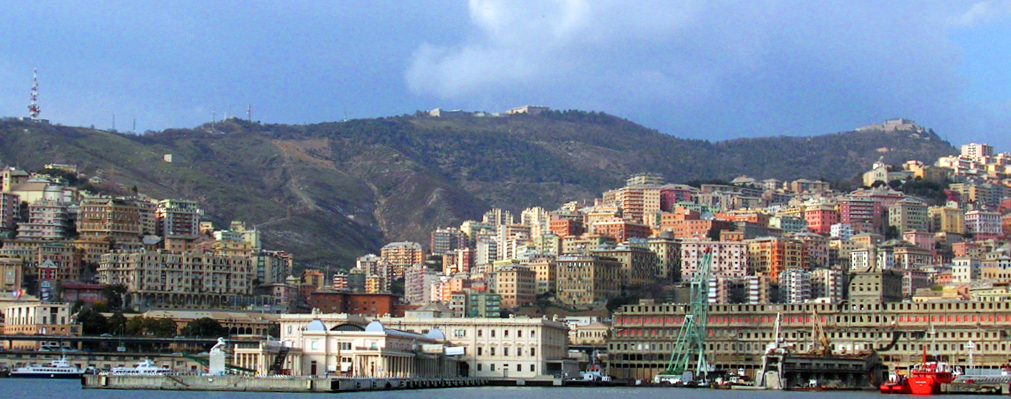 Panorámica de Génova